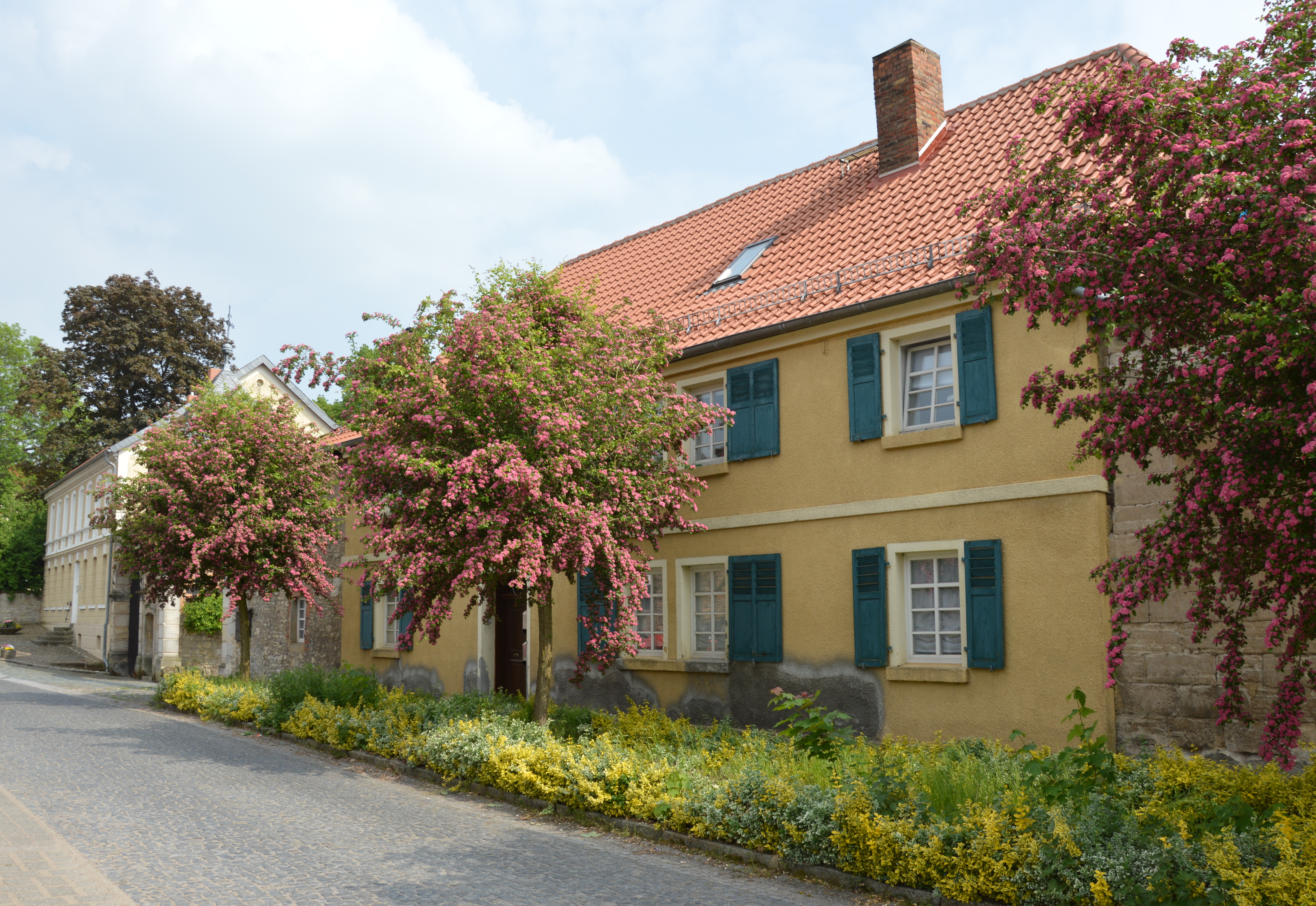 Haus Ackerwinkel 2, 3 in Hötensleben